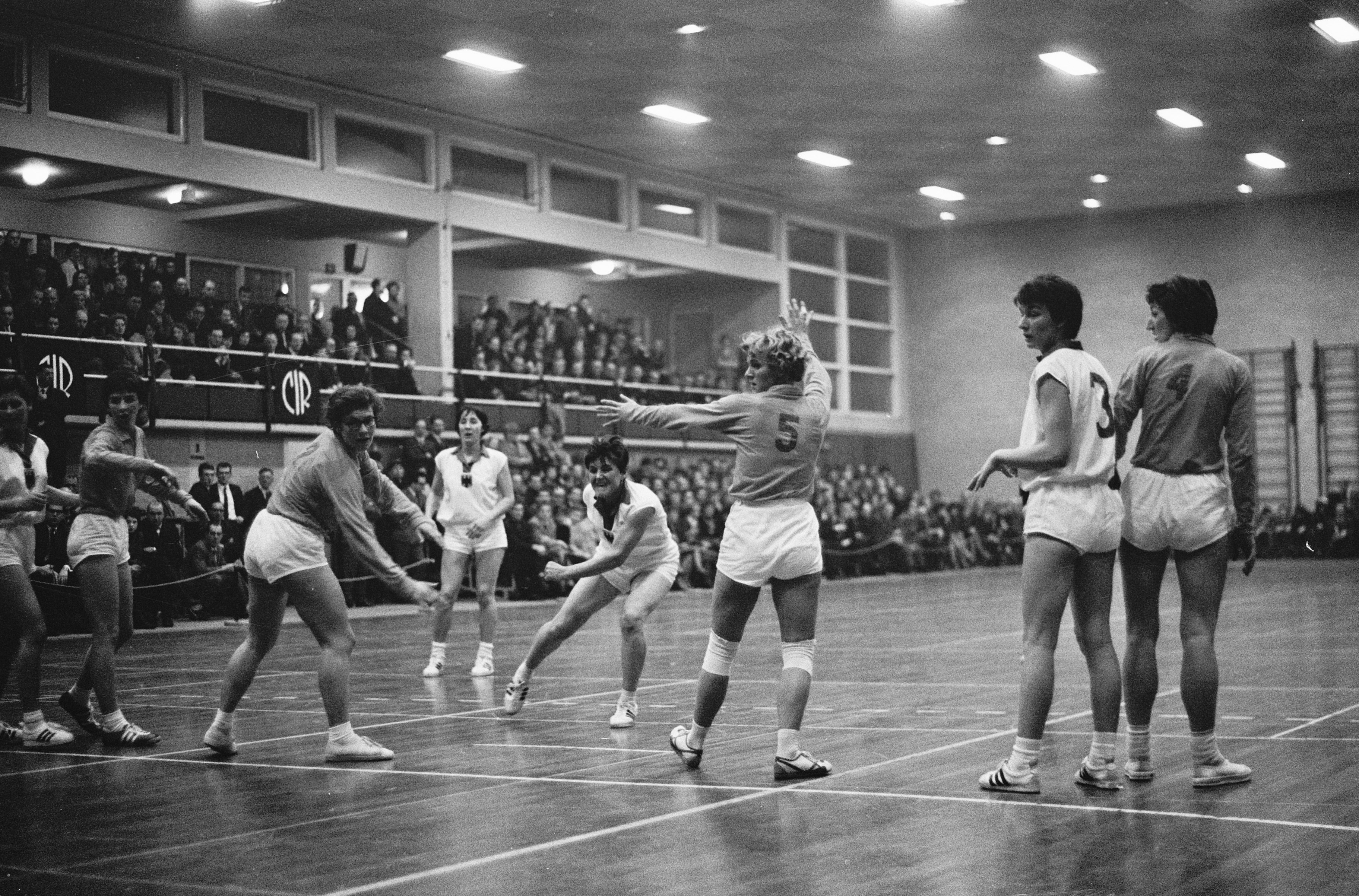 Collectie / Archief : Fotocollectie Anefo Reportage / Serie : [ onbekend ] Beschrijving : Zaalhandbal dames Nederland tegen Duitsland 4-8 te Roermond spelmomenten Datum : 23 januari 1965 Locatie : Limburg, Roermond Trefwoorden : Zaalhandbal Fotograaf : Gelderen, Hugo van / Anefo Auteursrechthebbende : Nationaal Archief Materiaalsoort : Negatief (zwart/wit) Nummer archiefinventaris : bekijk toegang 2.24.01.05 Bestanddeelnummer : 917-3653